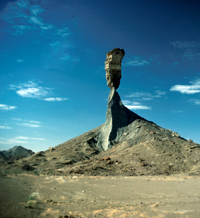 Mukurob naby Asab in Namibië